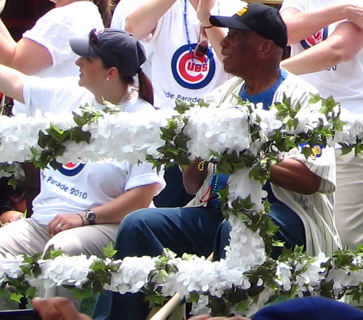 Chicago Gay Pride Parade 2010